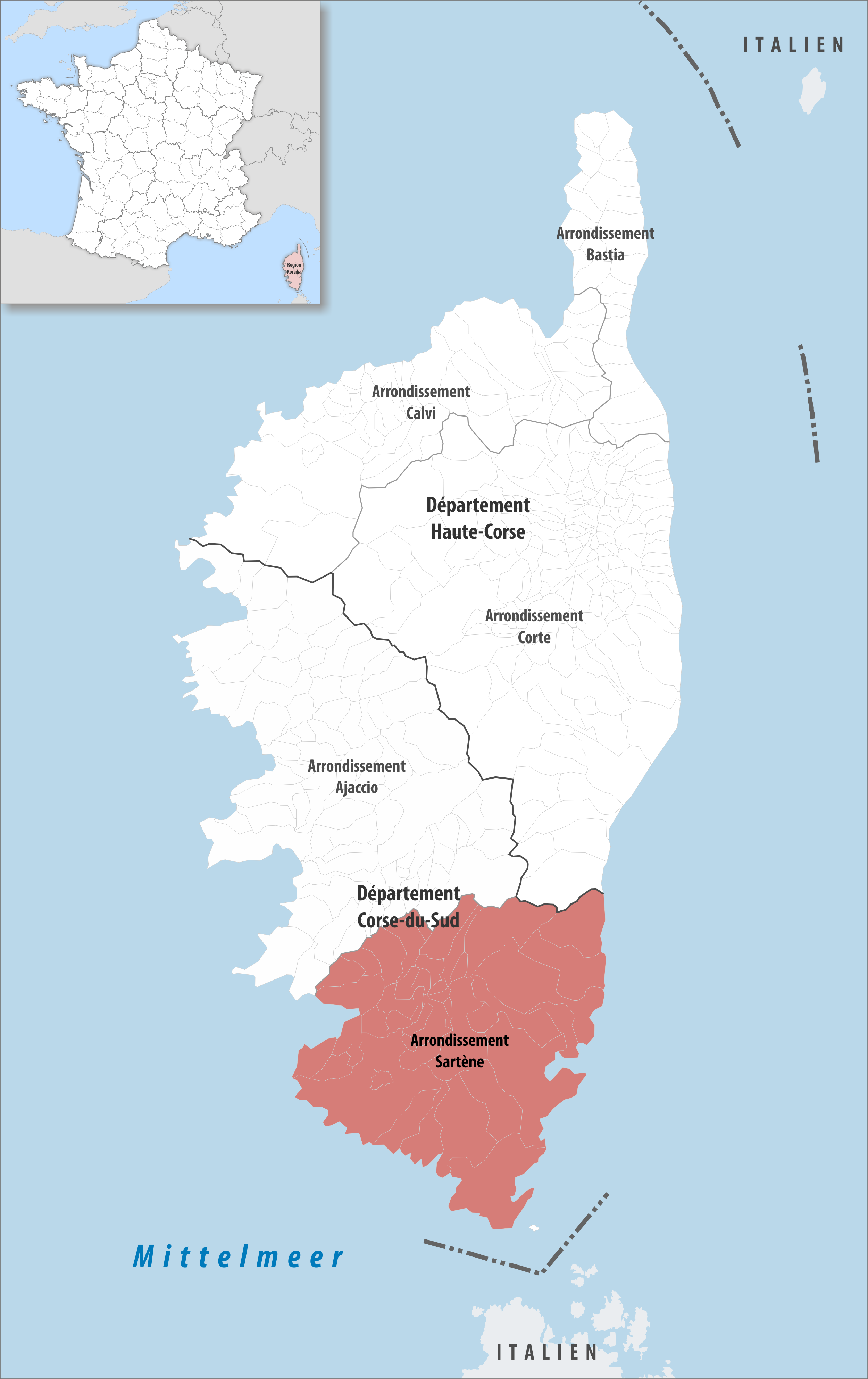 Lage des Arrondissements Sartène